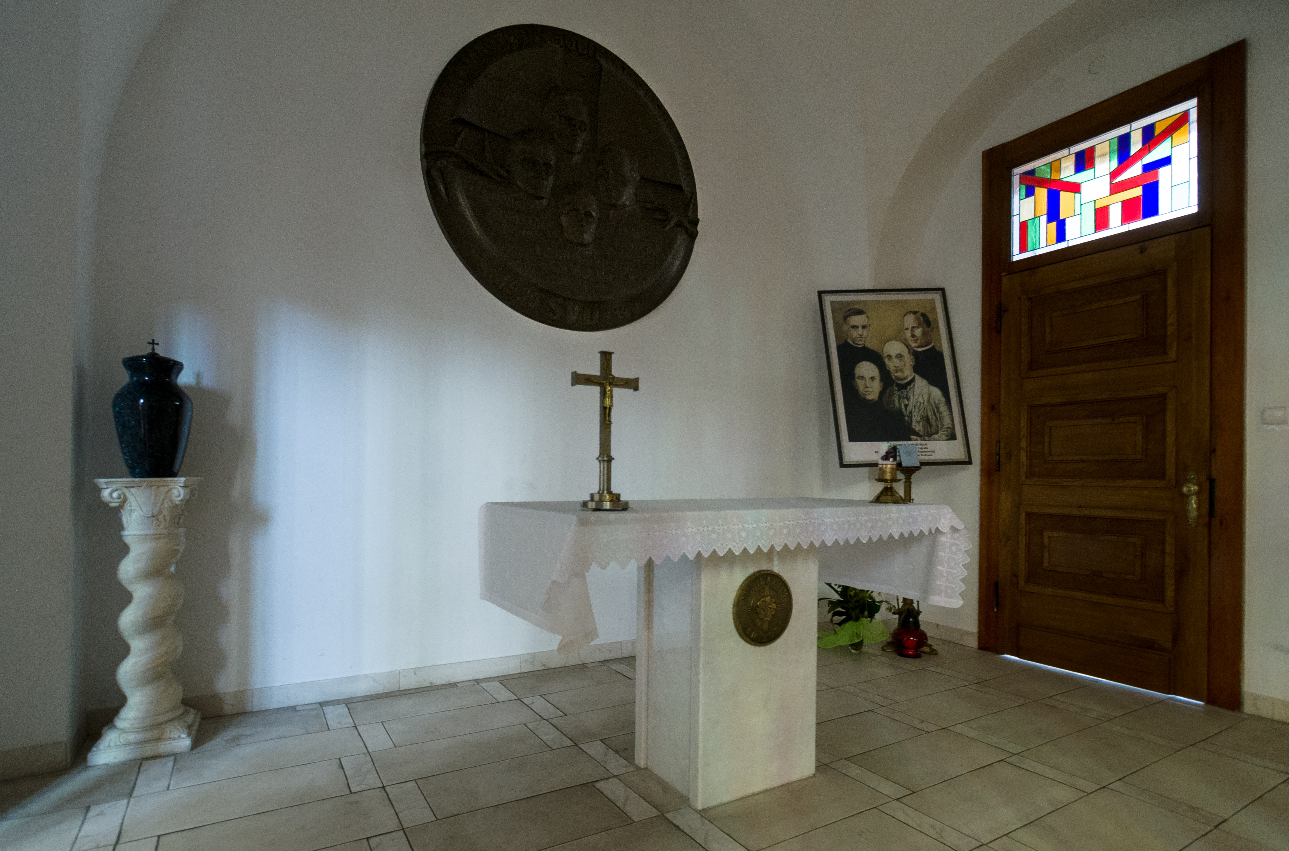 Kaplica Czterech Werbistów, Klasztor Werbistów w Pieniężnie.